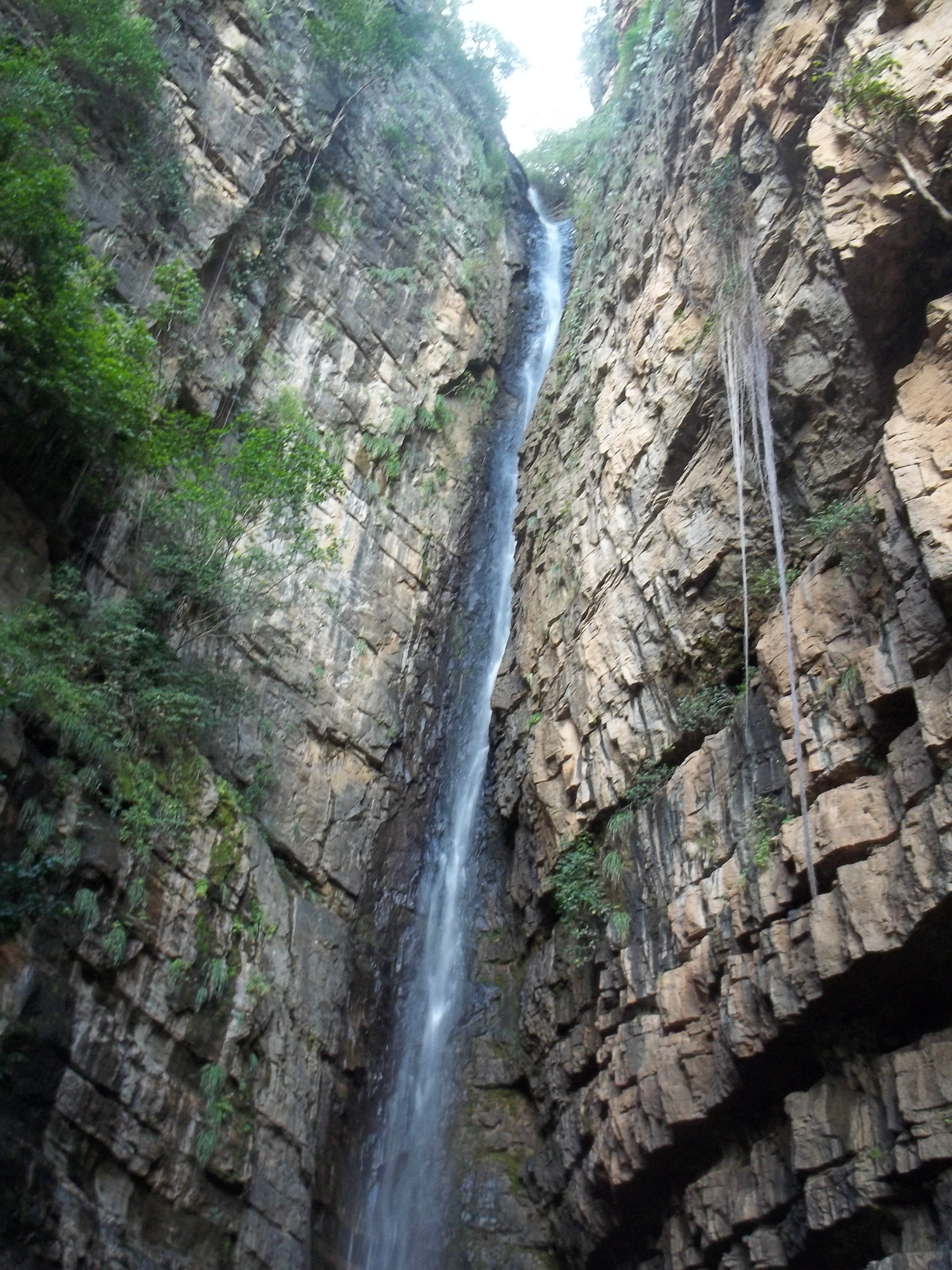 Bica Encantada Queda d'água